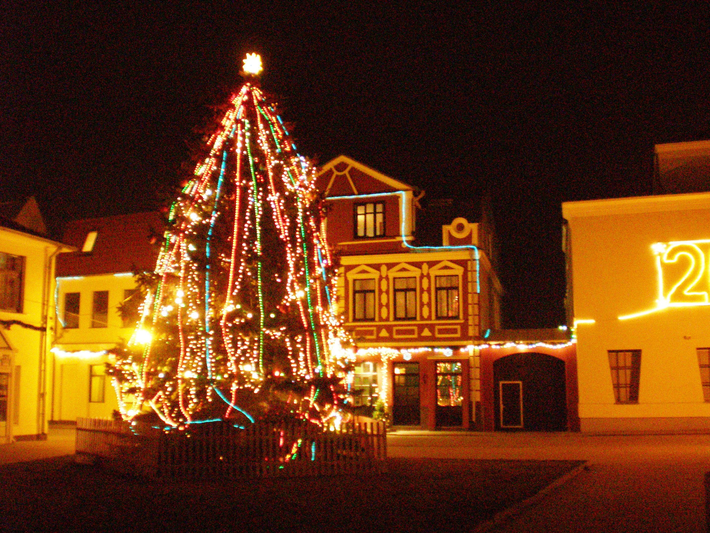 Árbol de Navidad en Kėdainiai